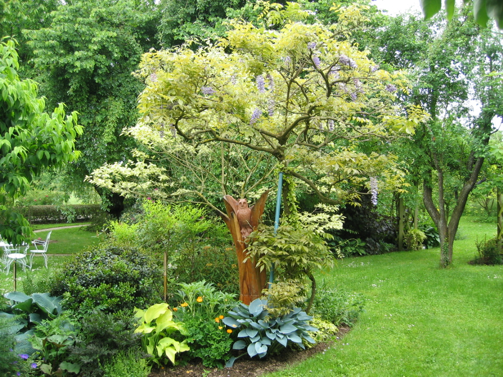 Jardin botanique à la Faulx de Dole en Franche Comté - France